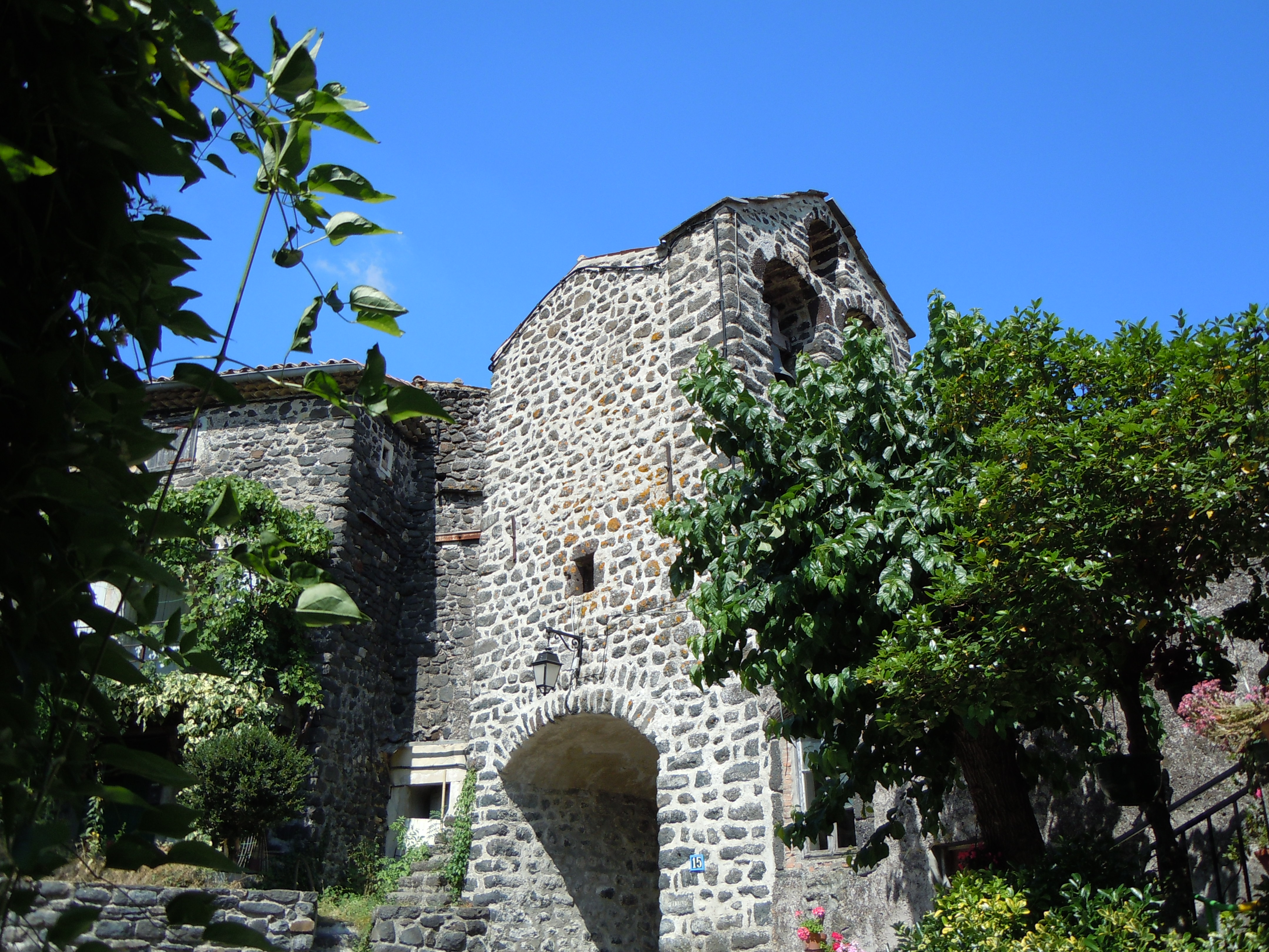 Sceautres Ardèche - France : Porte clocher fortifiée - XVème Siècle